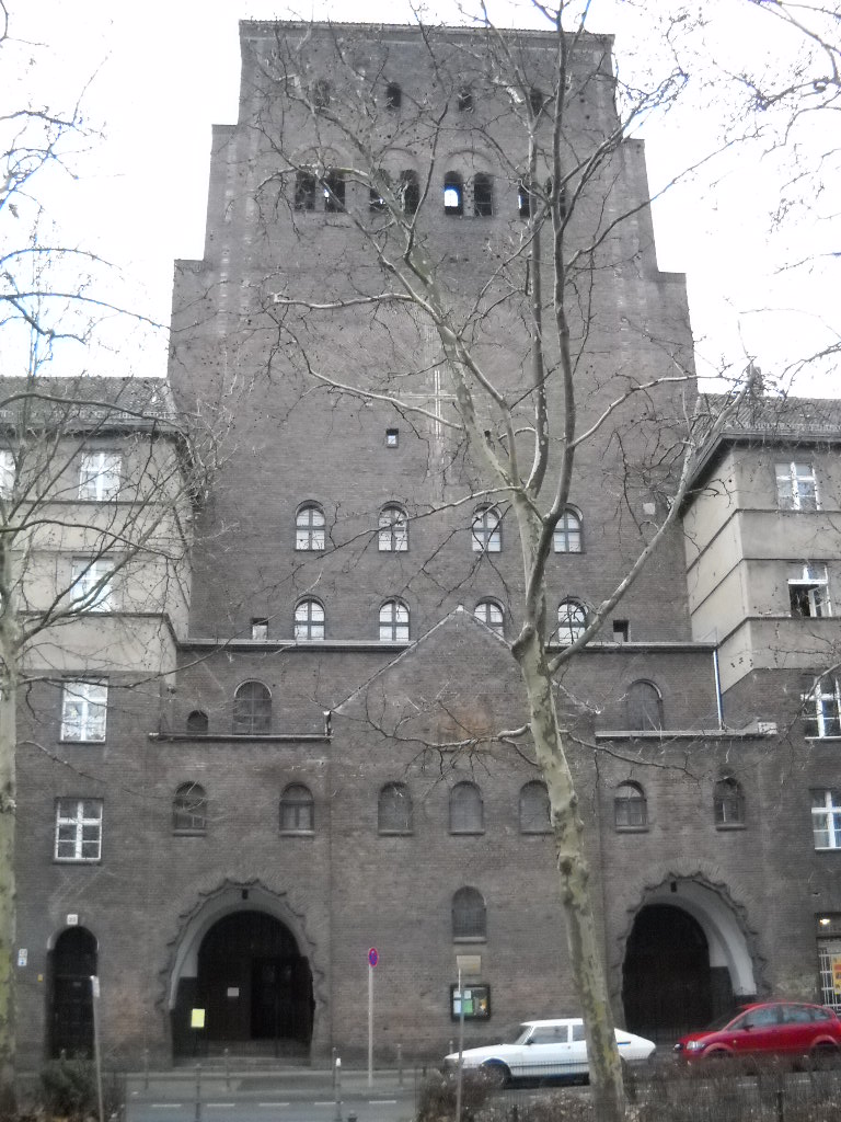 Katholische Kirche Heilige Familie